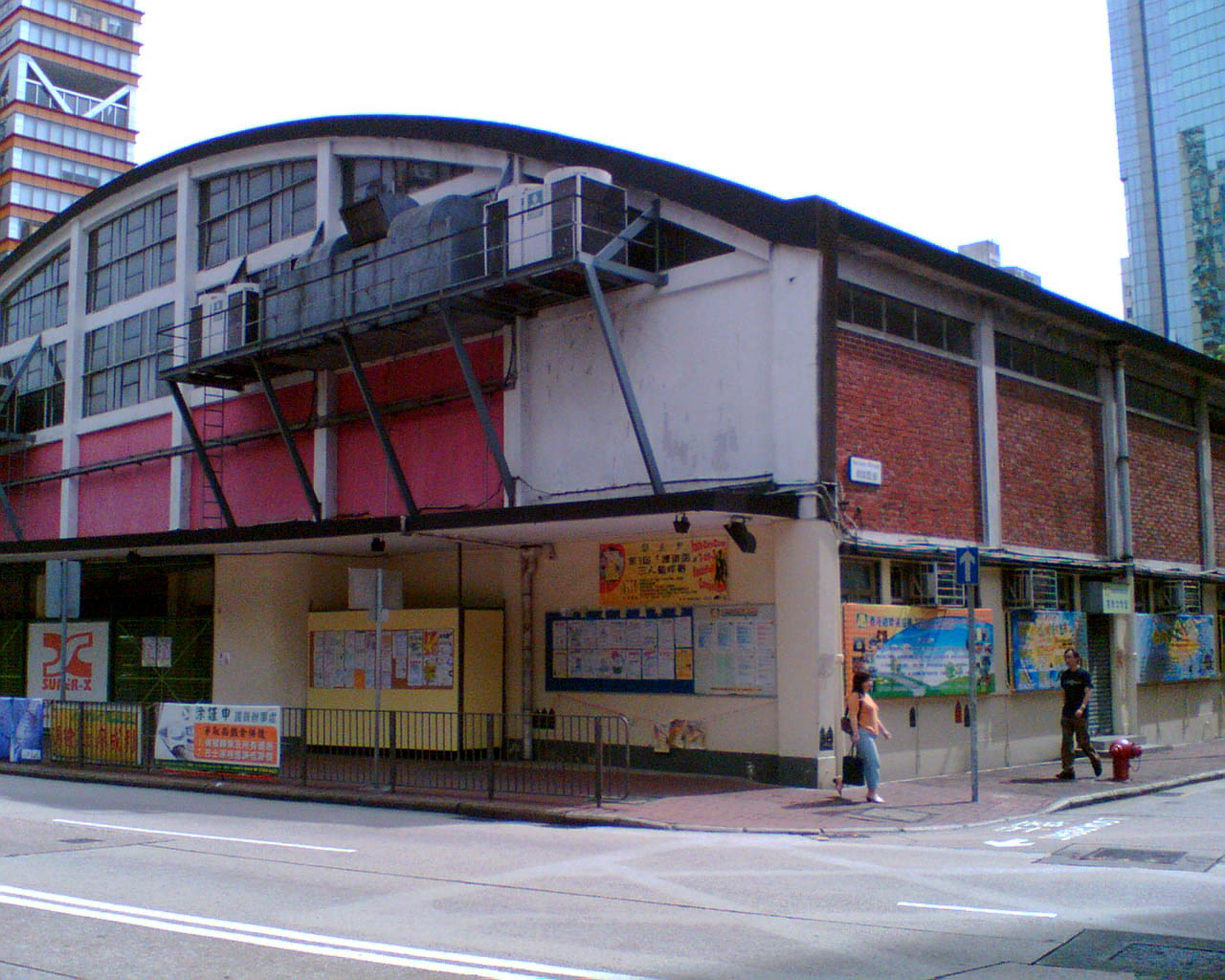 麥花臣室內場館外觀（二）